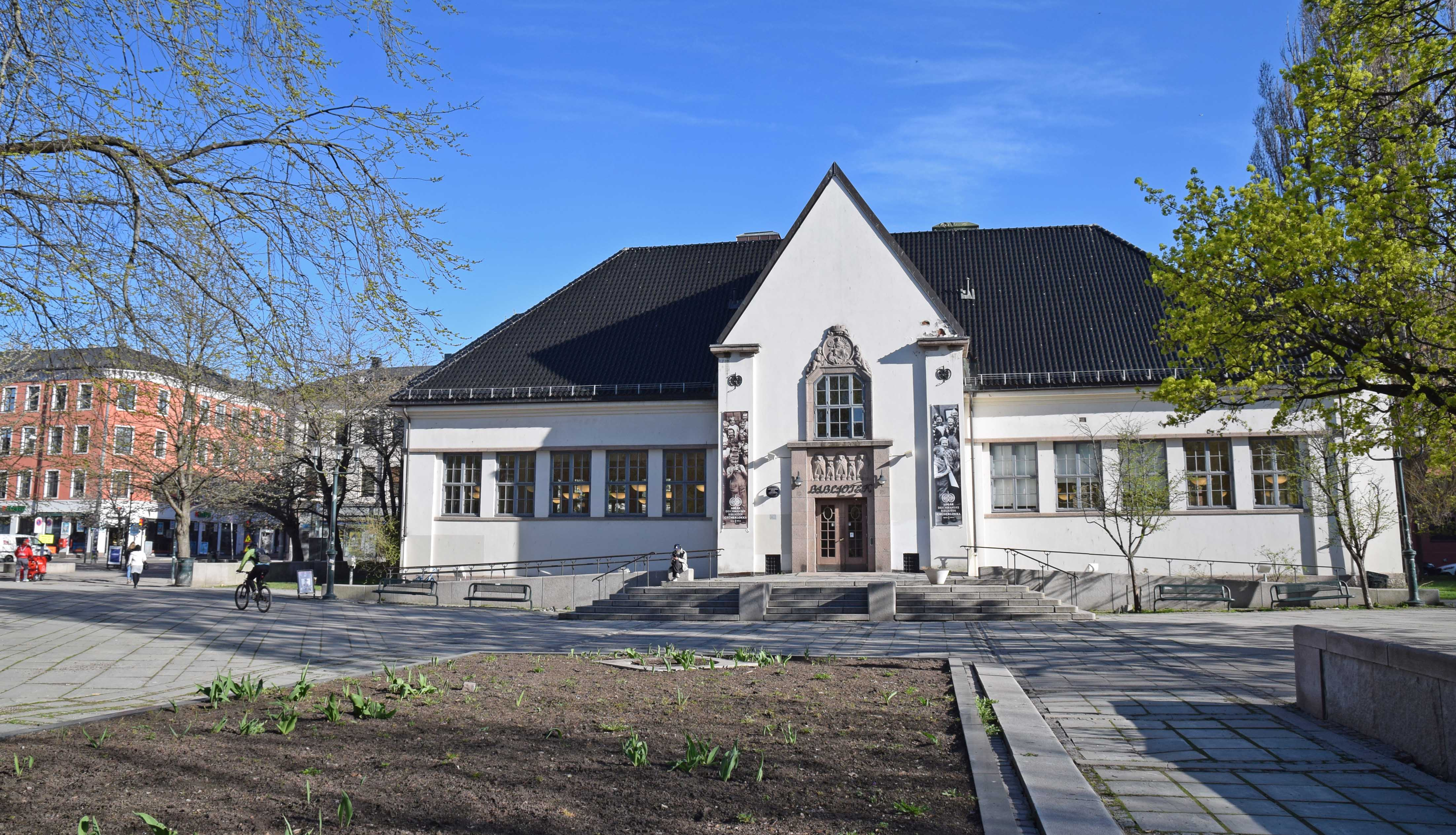 Schous plass med Deichmanske bibliotek